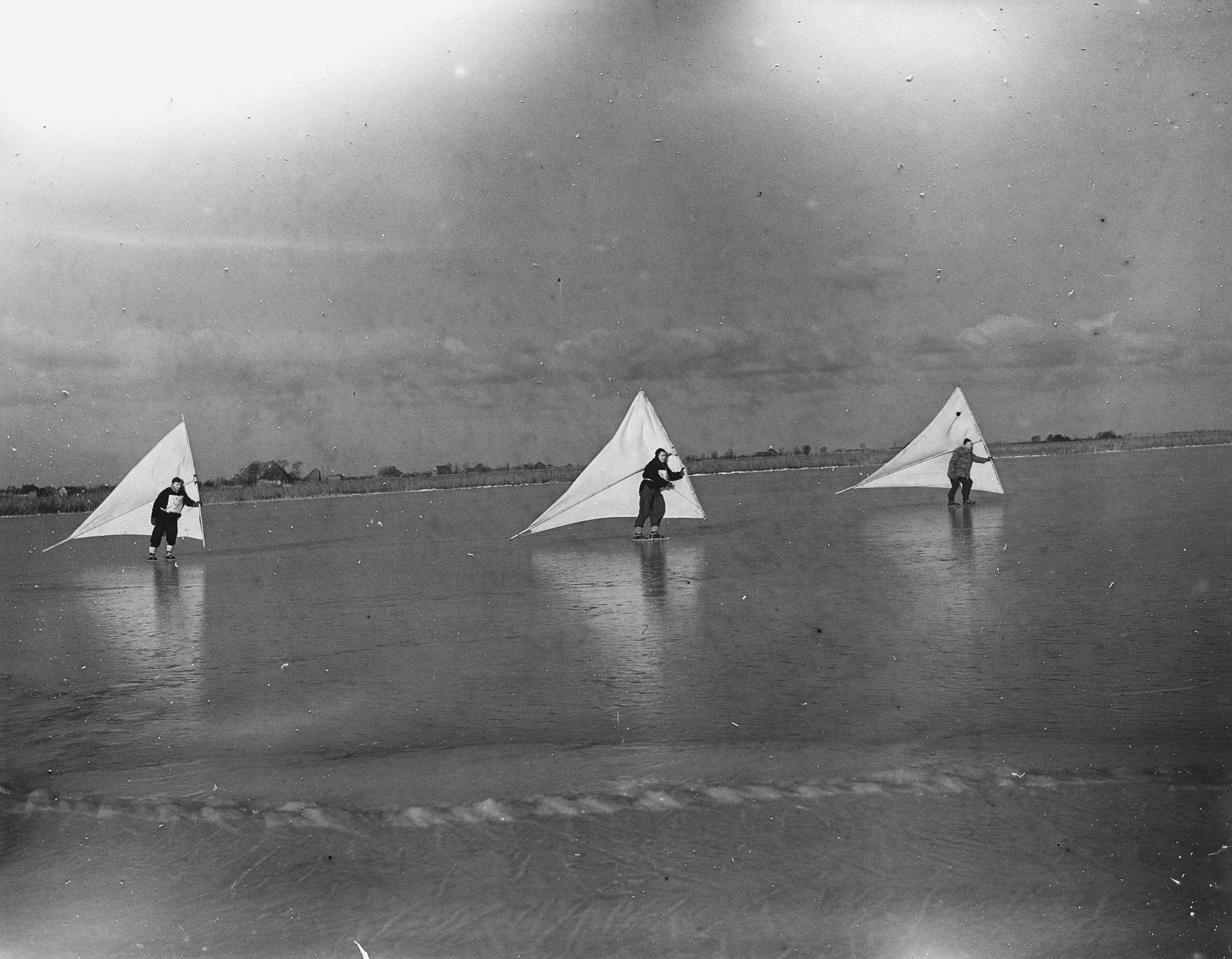 Collectie / Archief : Fotocollectie Anefo Reportage / Serie : [ onbekend ] Beschrijving : Wormer IJszeilwedstrijden Datum : 30 januari 1954 Locatie : Noord-Holland, Wormer, Zaanstad Trefwoorden : ijszeilen Fotograaf : Rossem, Wim van / Anefo Auteursrechthebbende : Nationaal Archief Materiaalsoort : Glasnegatief Nummer archiefinventaris : bekijk toegang 2.24.01.09 Bestanddeelnummer : 906-2708